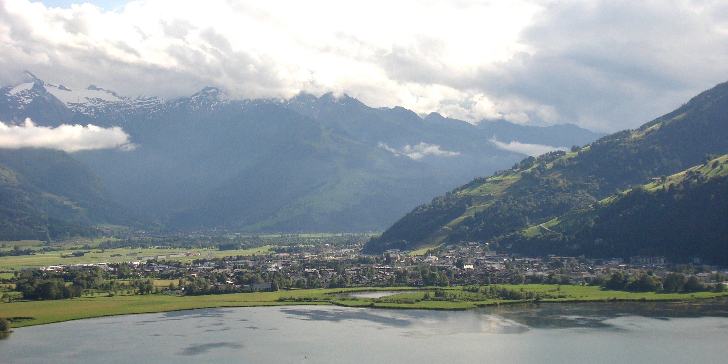 Zell am See-Süd/Schüttdorf bei Nacht